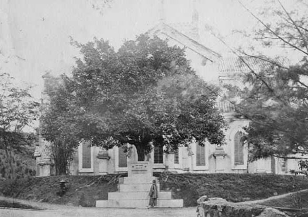 中文（香港）: 1869年香港聖約翰座堂。